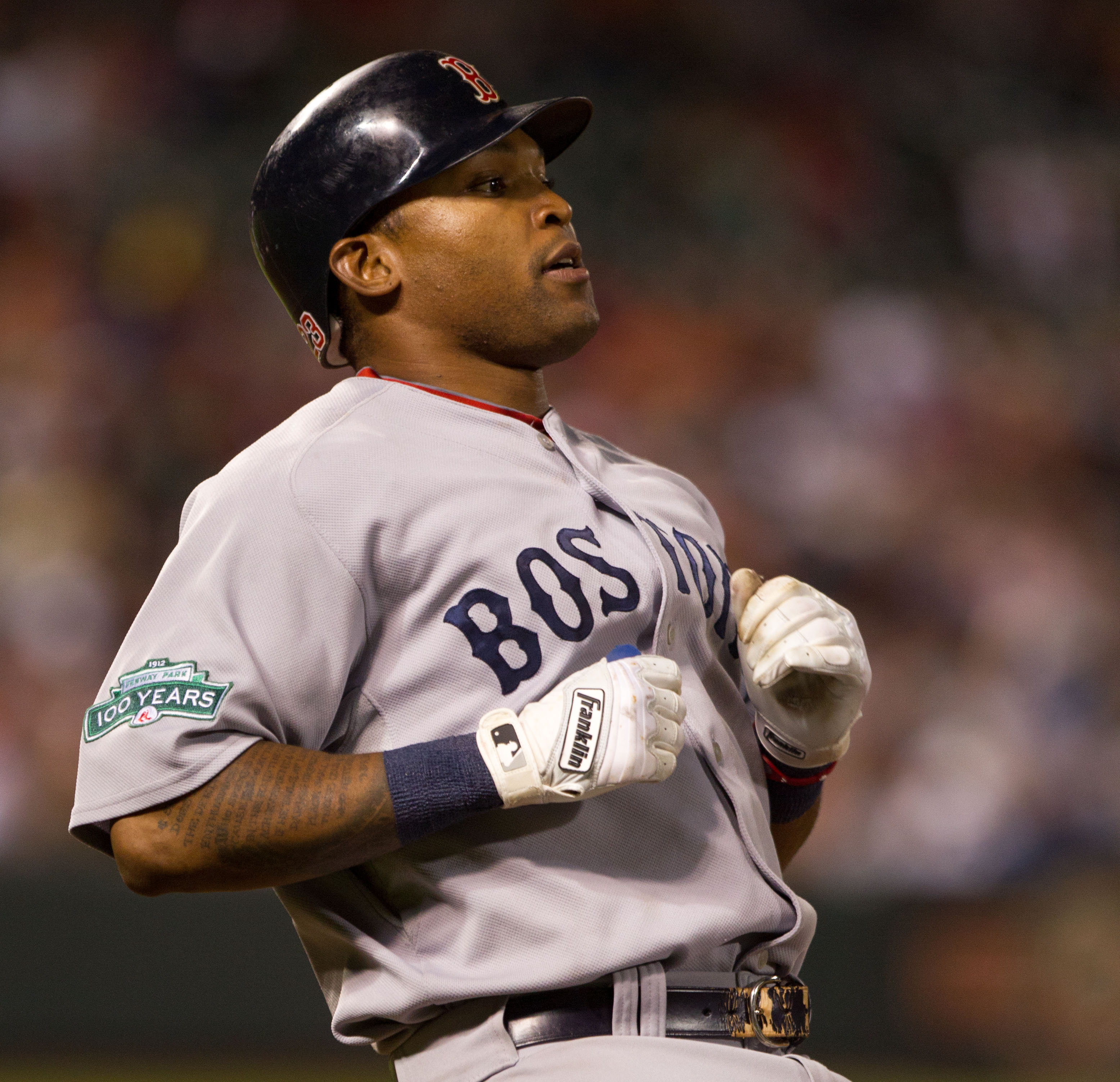 Marlon Byrd